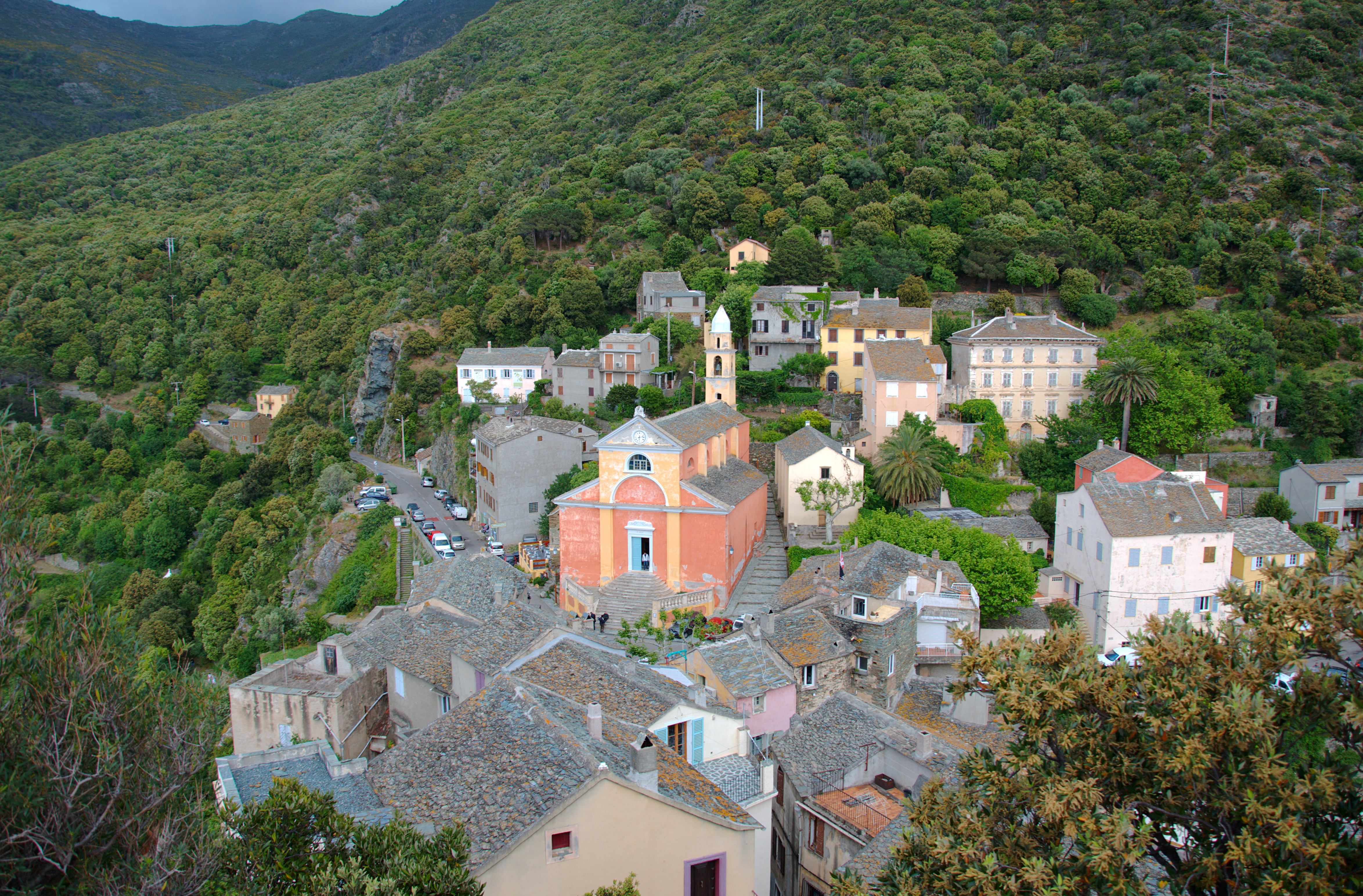 L'église Sainte-Julie de Nonza